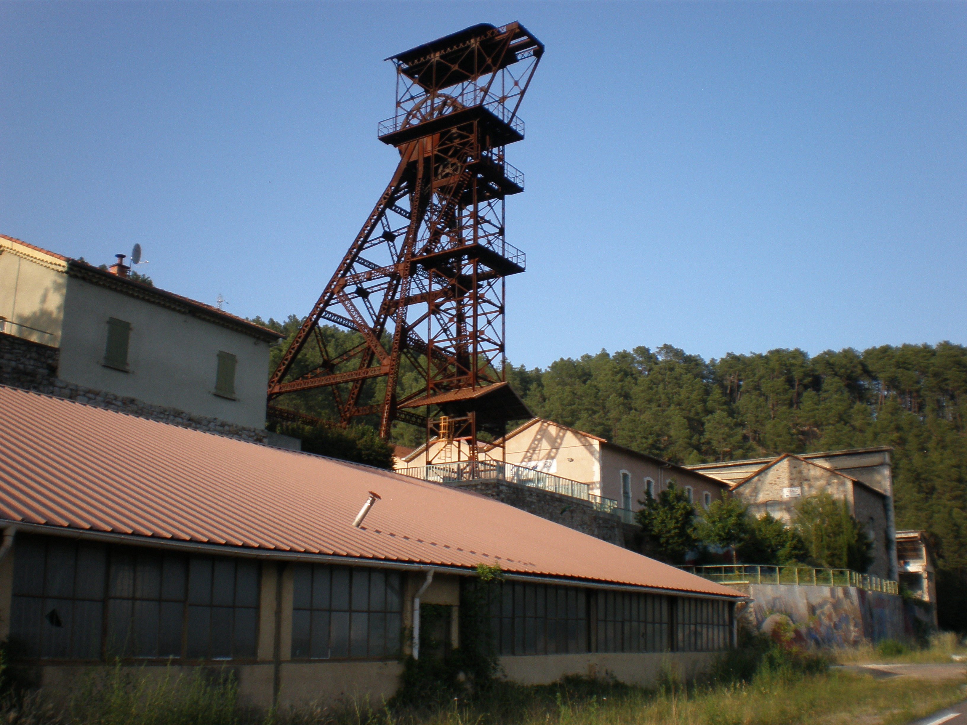 Chevalement des anciennes mines d'Alès au puits Destival-Fontanes sur la commune de Saint-Martin-de-Valgalgues (gard)